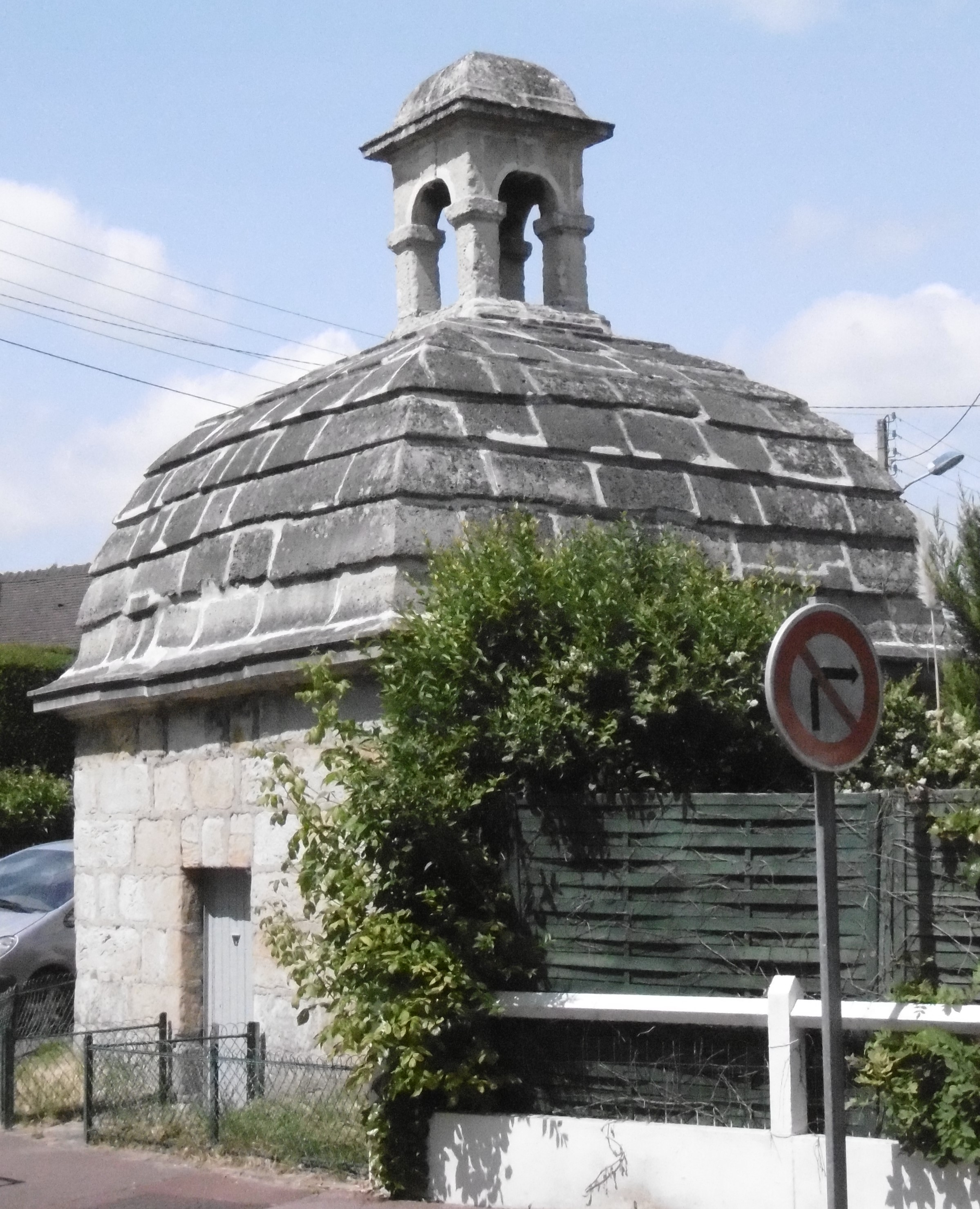 Chilly-Mazarin regard rue d'Effiat